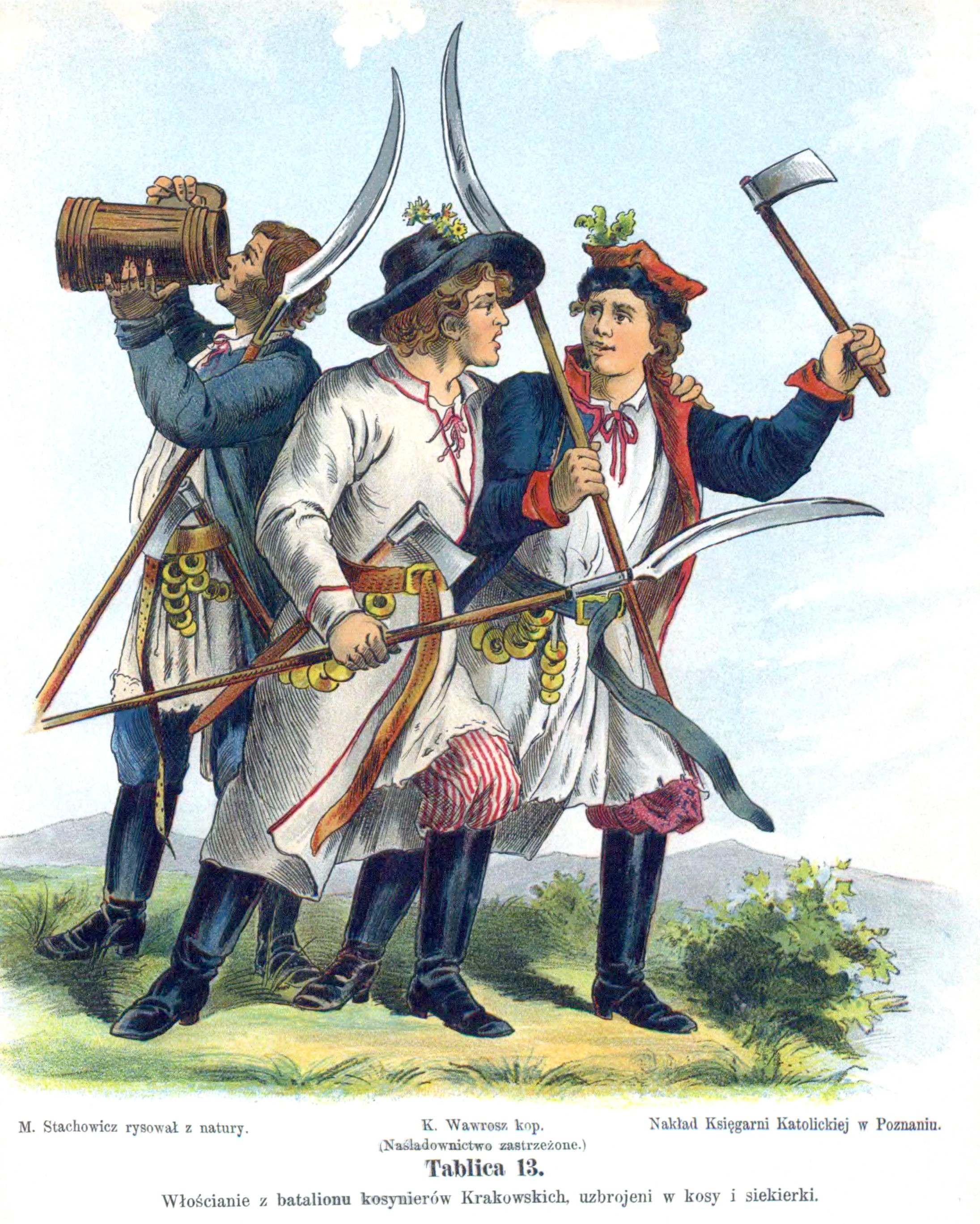 Kościuszko Uprising army